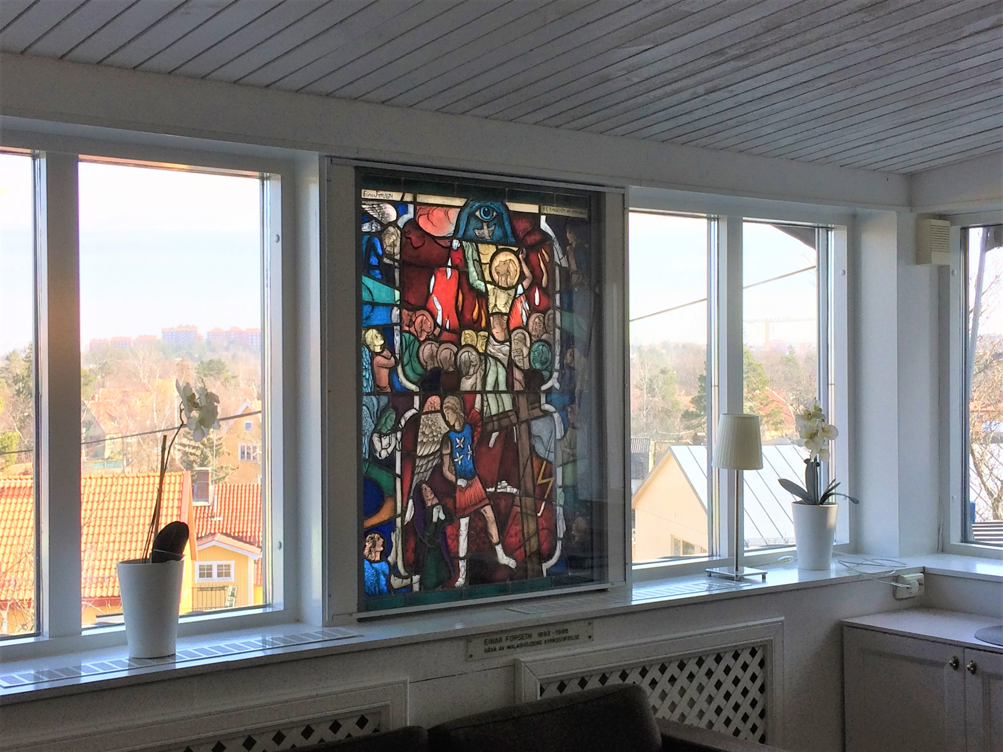 Mälarhöjdens kyrka, interiör, glasmålning av Einar Forseth.